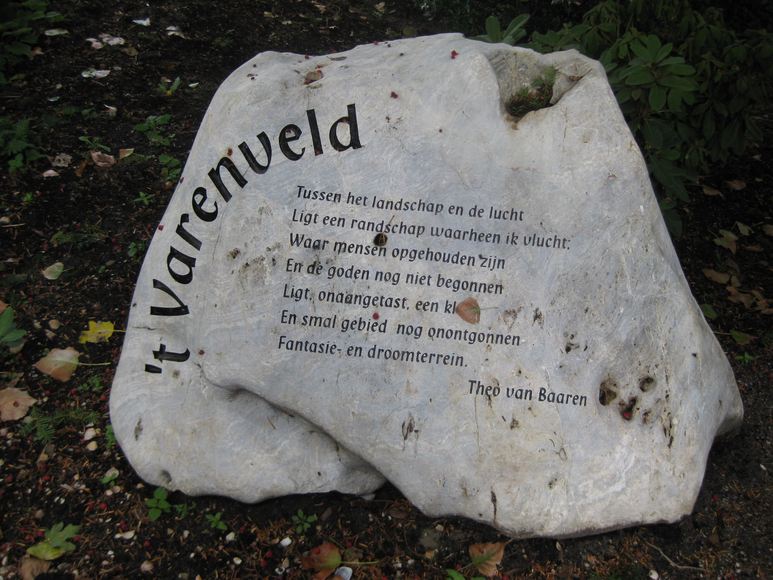 Entree van grafwijk 't Varenveld op begraafplaats Zorgvlied in Amsterdam